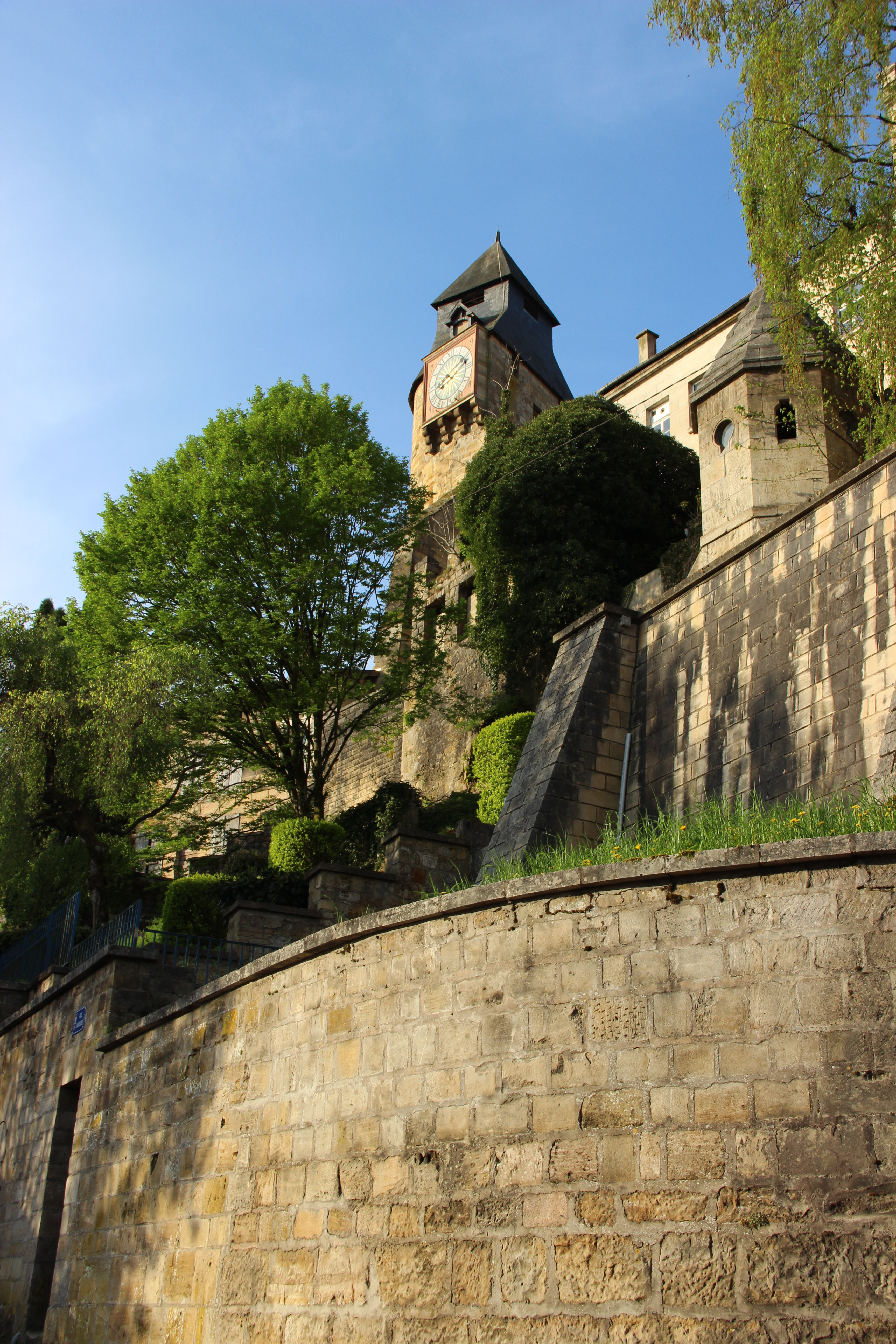 La Tour de l'Horloge et une partie des anciens remparts.